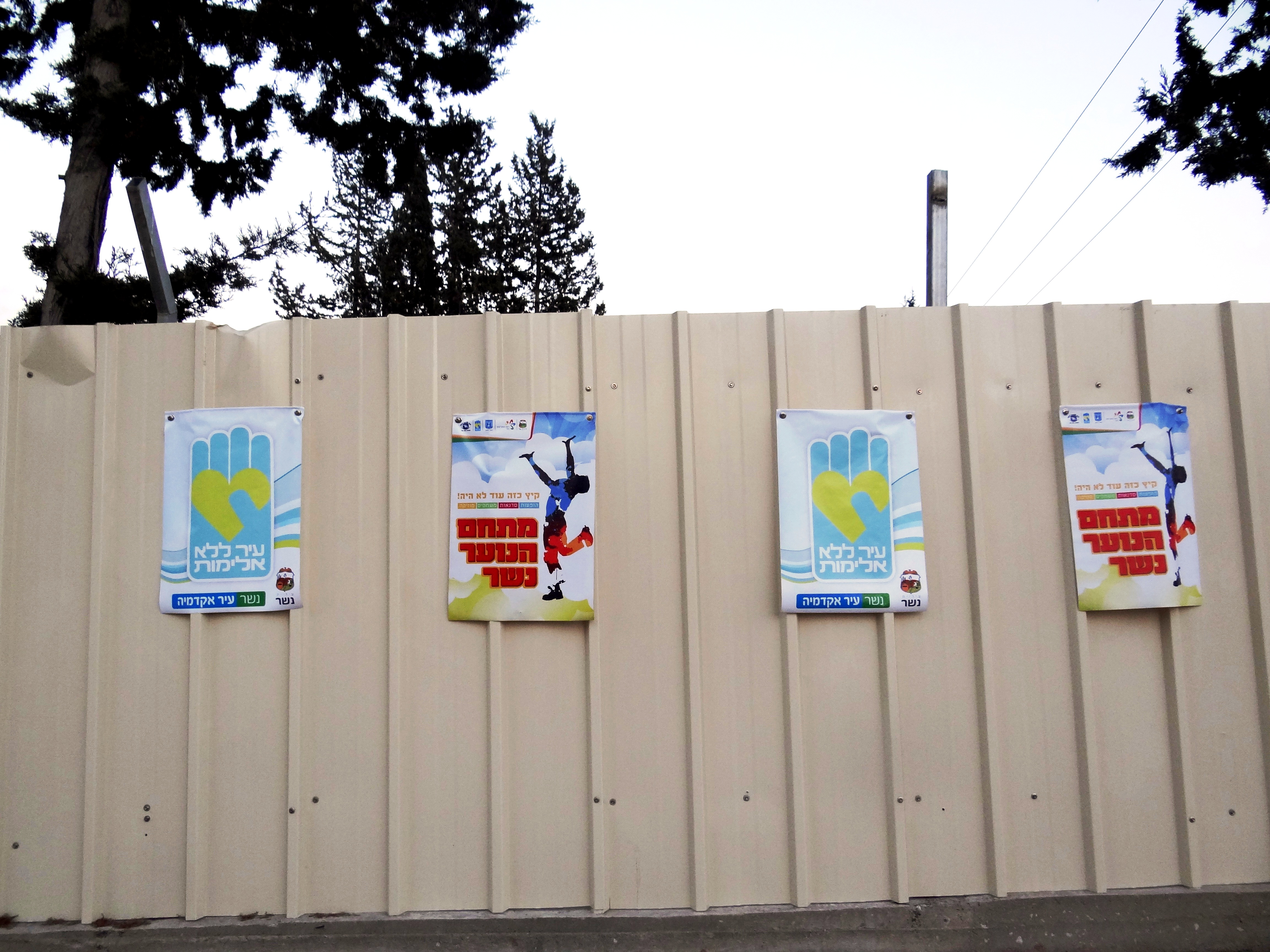 עיר הנוער הראשונה בנשר העיר נפתחה ב-2 ביולי 2014 במתחם הבסיס הצבאי לשעבר השוכן בצומת של כביש 752 עם כביש 705 בגבול בין שכונת נשר הוותיקה ושכונת תל חנן עיר הנוער תימשך עד 27 באוגוסט 2014.